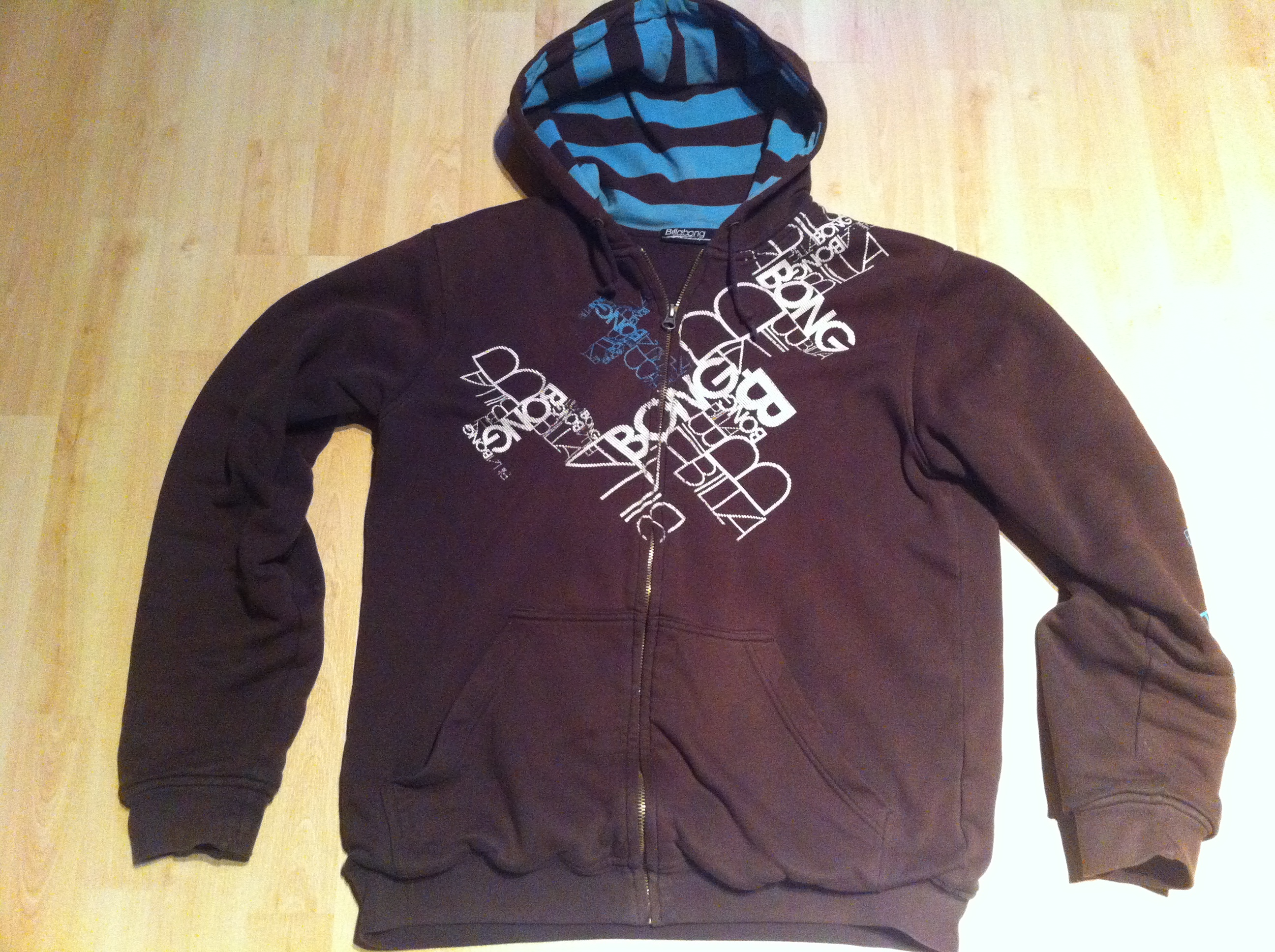 Herren Kapuzenpullover